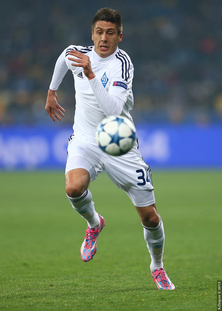 20.10.2015 Kyiv, Olimpiyskiy National Sports Complex Champions League. Group stage. FC Dynamo Kyiv - Chelsea - 0:0 Chelsea (4-2-3-1): Begovic; Zouma, Cahill, JT (c), Azpilicueta; Ramires, Matic; Willian, Fabregas (Oscar 75), Hazard; Diego Costa. Unused subs Blackman, Baba, Mikel, Traore, Kenedy, Falcao. Booked Zouma 67 Dynamo Kiev (4-1-4-1): Shovkovskiy; Danilo Silva, Khacheridi, Dragovic, Vida; Rybalka; Yarmolenko, Sydorchuk, Buyalskiy (Garmesh 83), Gonzalez; Kravets (Junior Moraes 78). Unused subs Rybka, Antunes, Petrovic, Gusev, Miguel Veloso. Booked Buyalskiy 65 20.10.2015 г.Киев. НСК "Олимпийский". Лига Чемпионов. Групповой этап Динамо — Челси 0:0 Динамо: Шовковский — Данило Силва, Драгович, Хачериди, Вида — Рыбалка, Буяльский (Гармаш, 83) — Ярмоленко, Сидорчук, Гонсалес — Кравец (Мораес, 78) Челси: Бегович — Аспиликуэта, Терри, Кэхилл, Зума — Матич, Рамирес — Виллиан, Фабрегас (Оскар, 75), Азар — Д. Коста Предупреждения: Буяльский — Зума